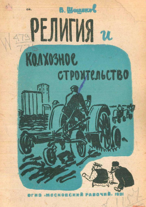 Обложка пропагандистской книги "Религия и колхозное строительство", 1931 г.